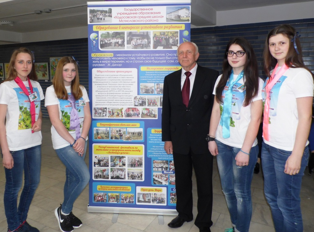 Ученики Ходосовской средней школы участвовали в Республиканском Фестивале по экономике и предпринимательству среди молодёжи "Лестница успеха-2016.